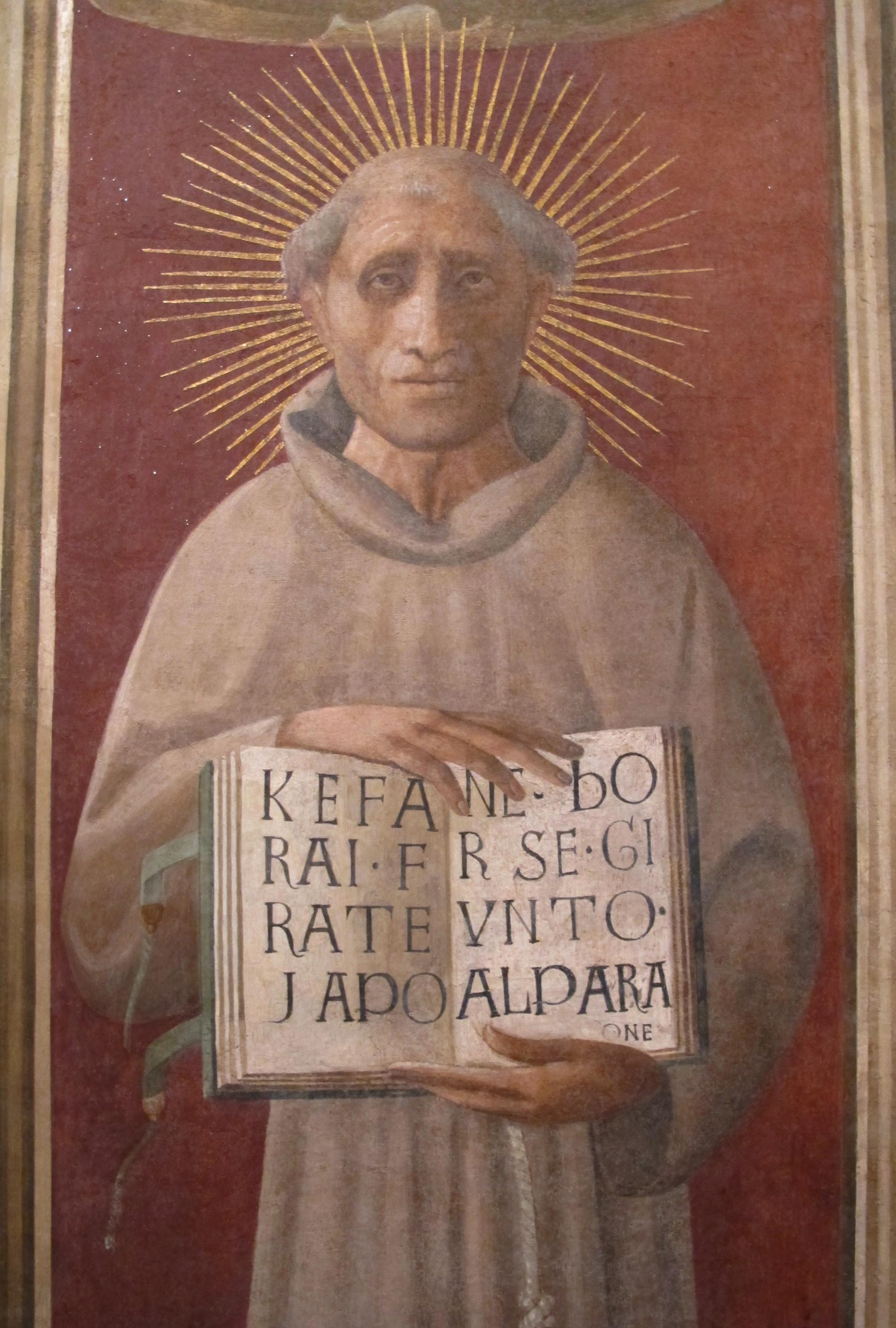 Paolo uccello, beato iacopone da todi, 1435-36, da duomo di prato